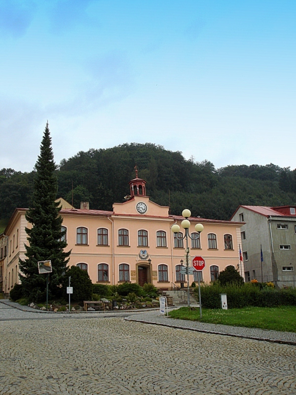 Zaclerz, ratusz